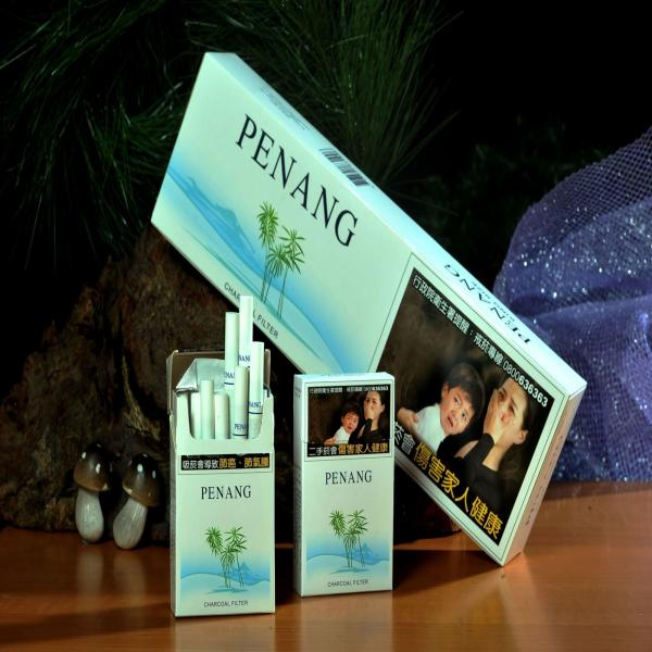 Penang Cigarette Packs